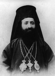 Iosif_of_Ohrid.